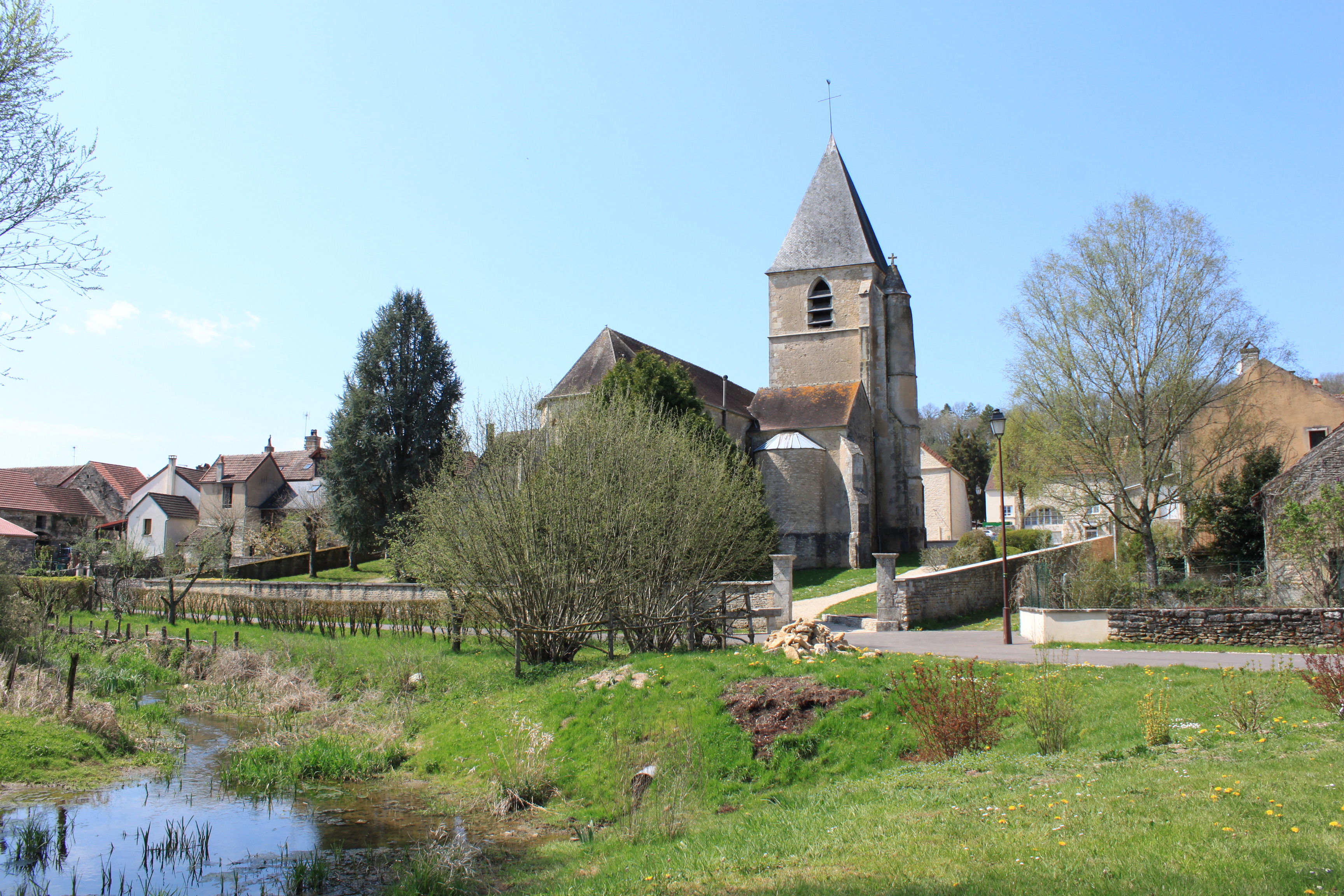 Massangis, Yonne, Bourgogne, France